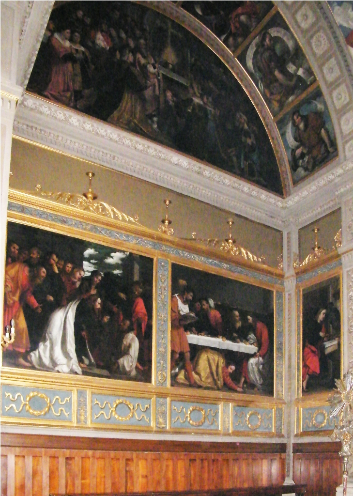 Resurrezione di Lazzaro - Cena in casa del Farieseo (Romanino) - Chiesa di S. Giovanni Evangelista - Brescia